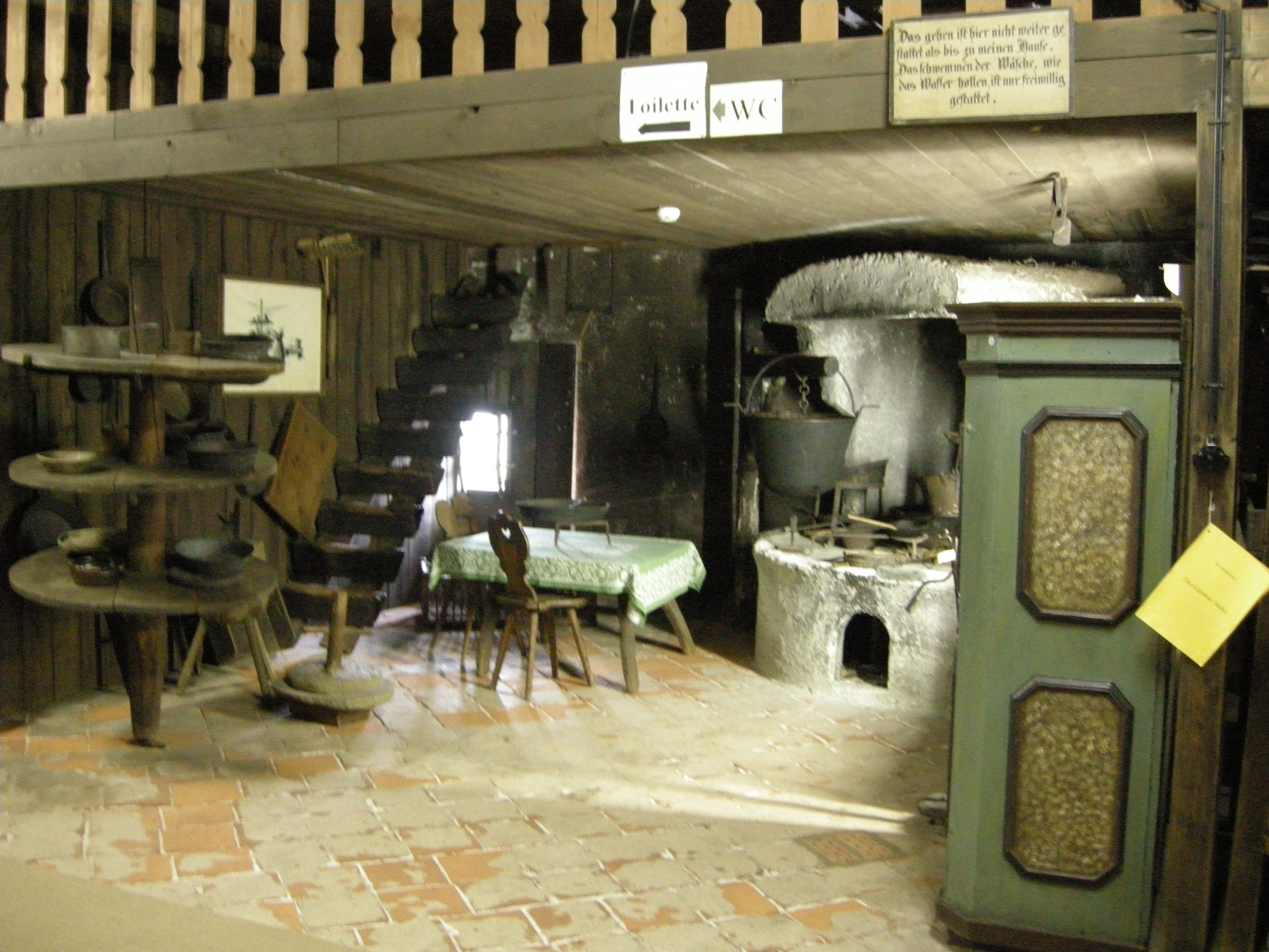 Spittal an der drau, schloss porcia, museo